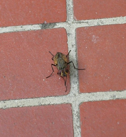 Photo perso